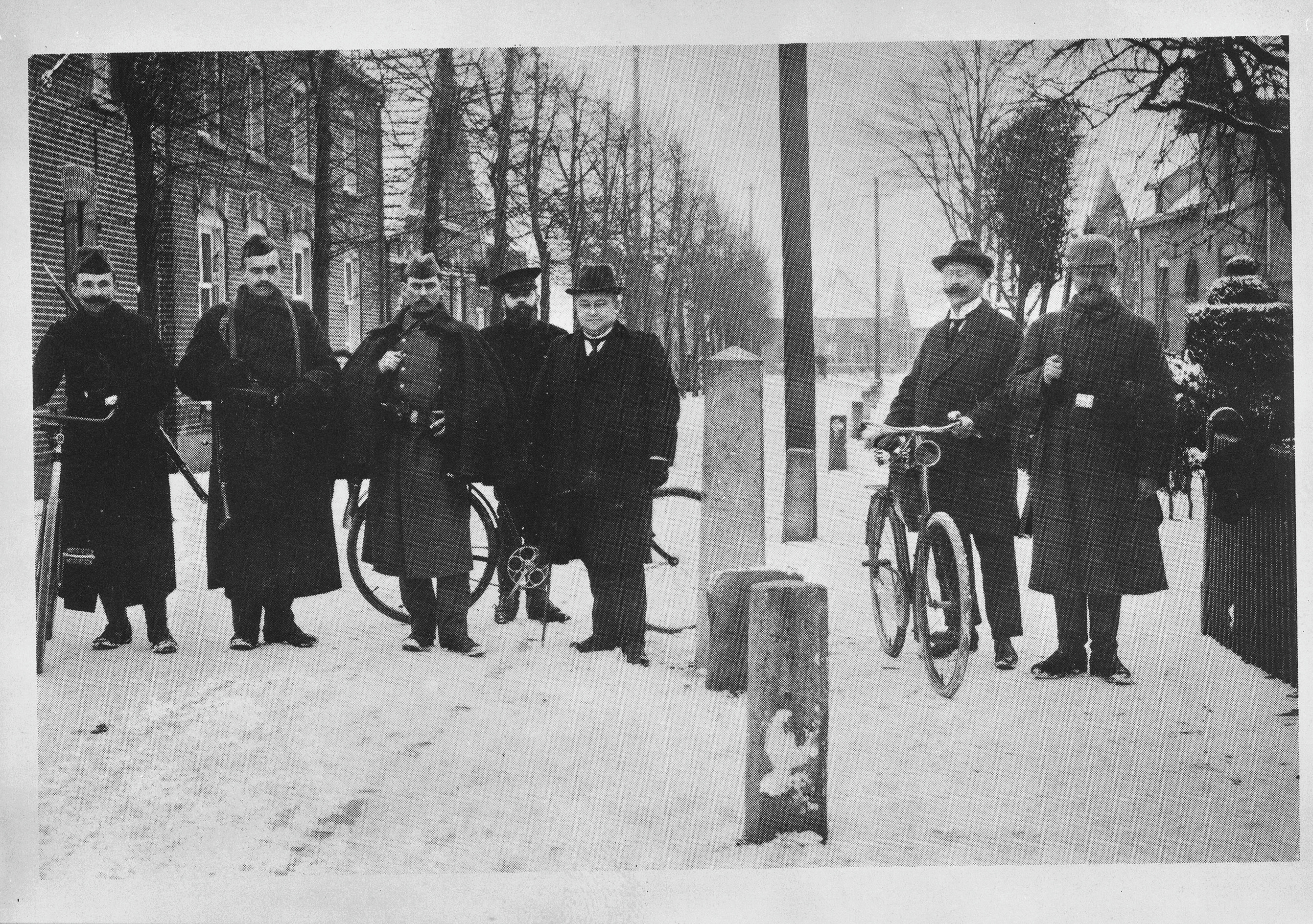 grenspaal, reproductie uit Dinxperlo in oude ansichten 1914-18.